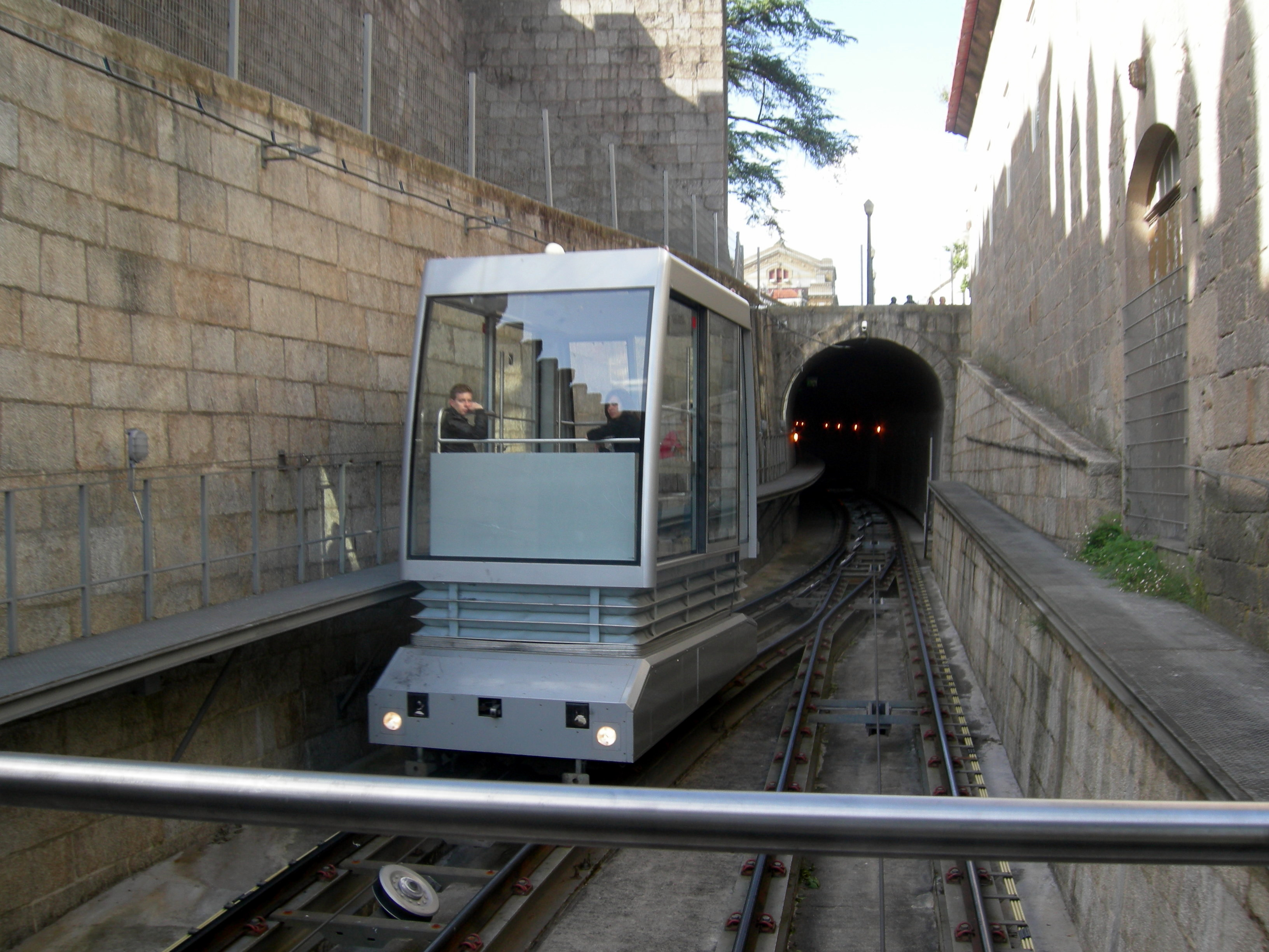 Porto